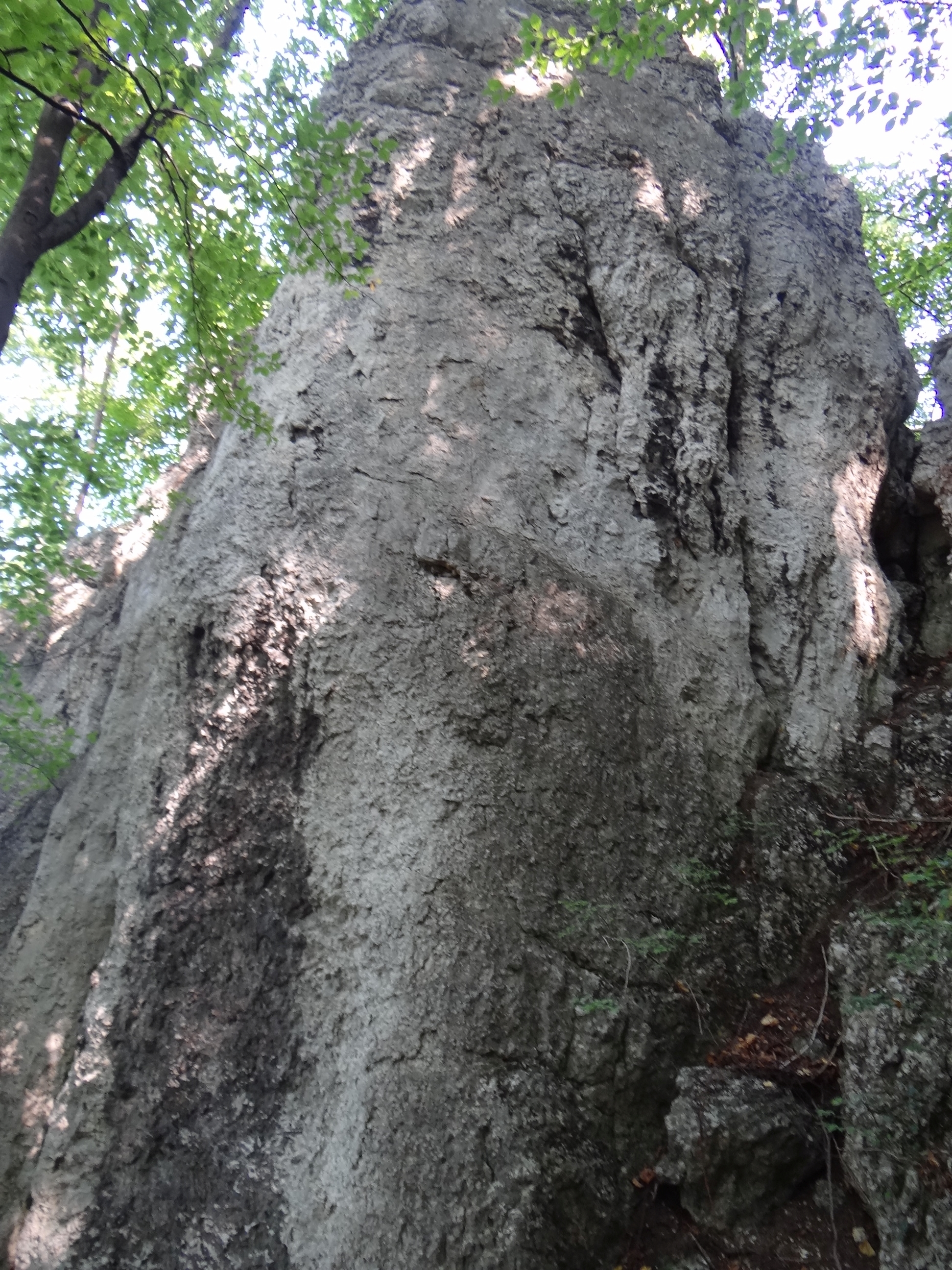 Skała poniżej Skały nad Źródłem w Dolinie Będkowskiej